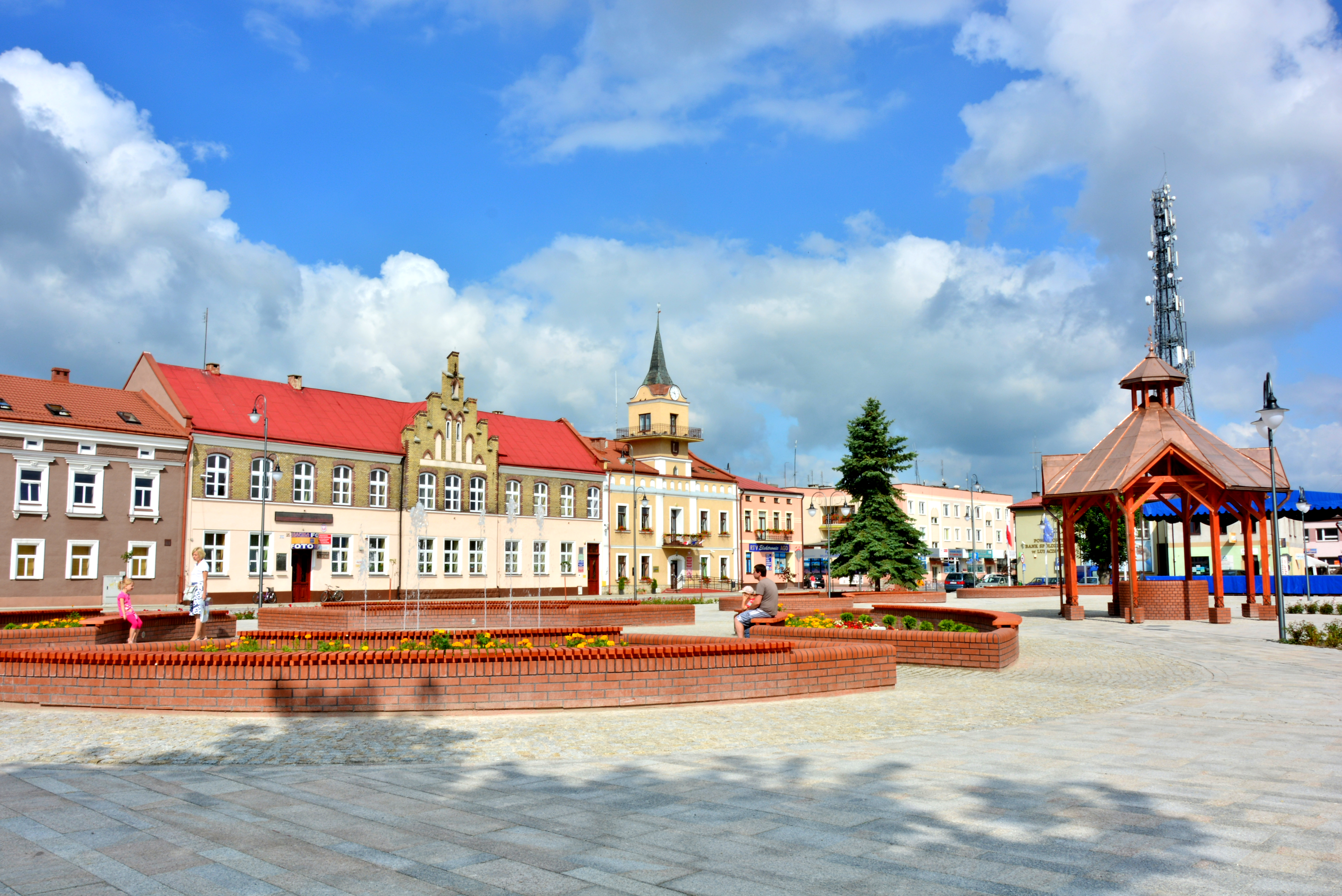 Zdjęcie Rynku Miejskiego w Lubaczowie